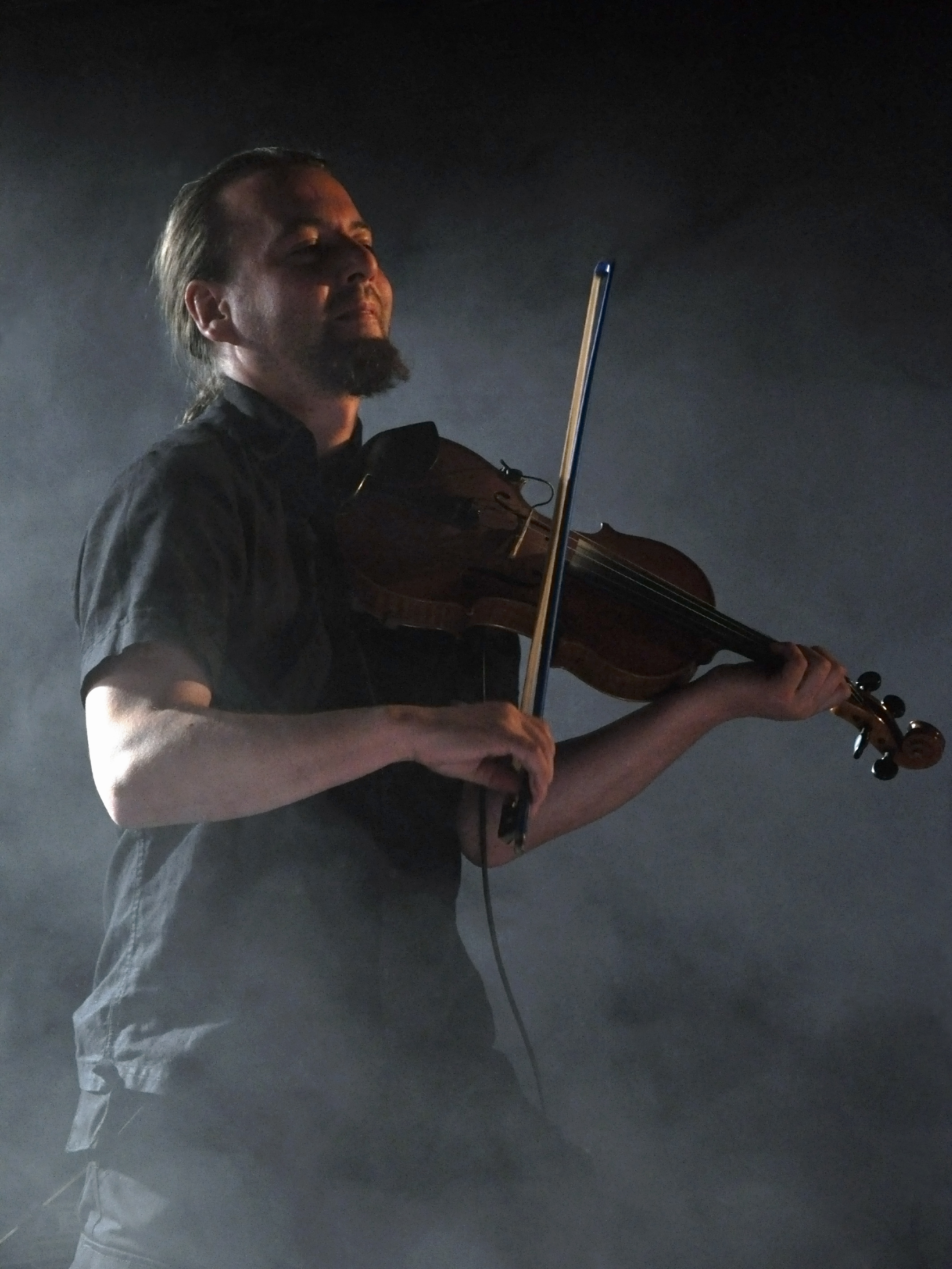 Dornenreich en concert au Glazart, à Paris, le 25/03/2009: Inve.